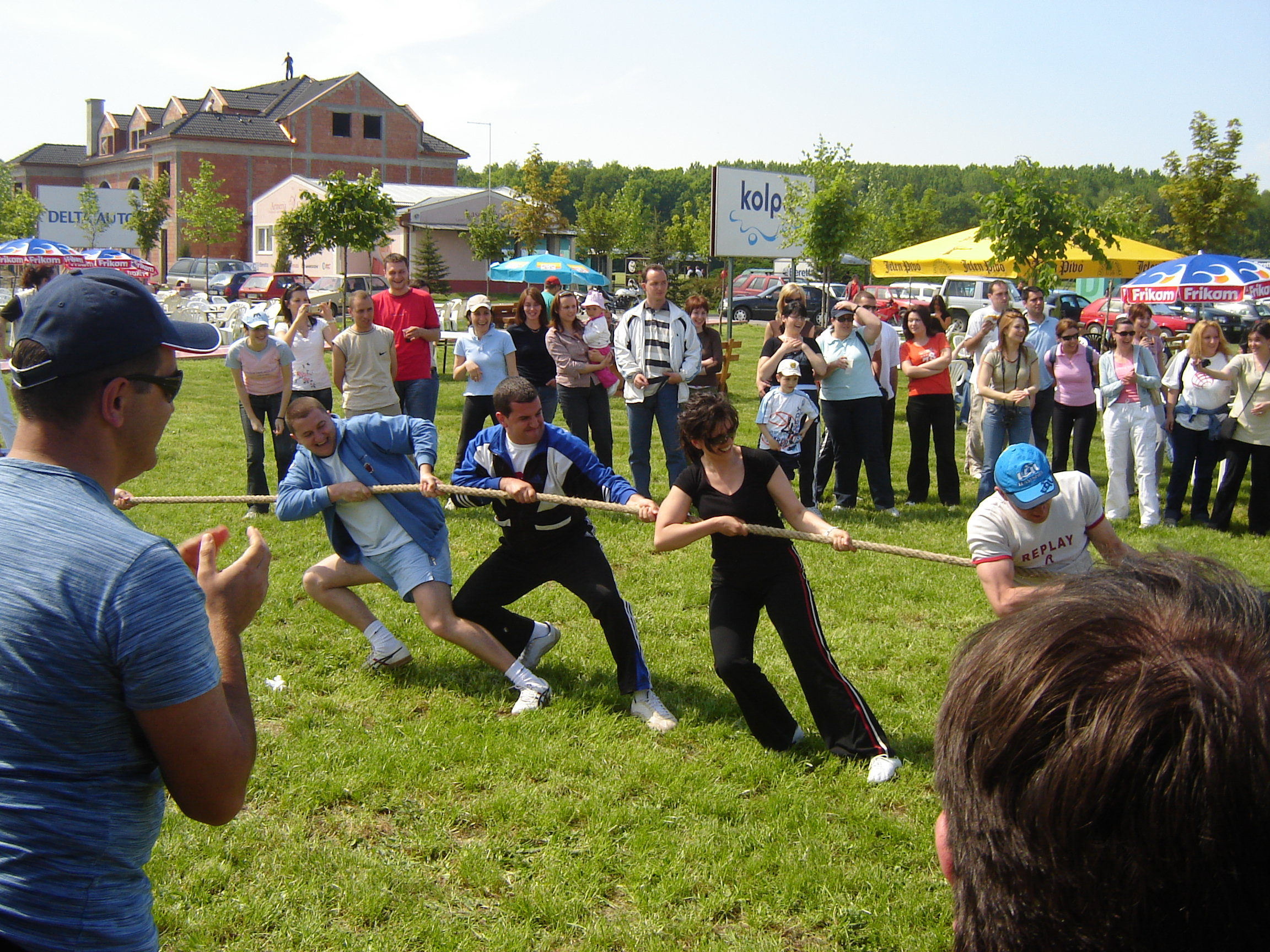 Надвлачење конопца Licensing